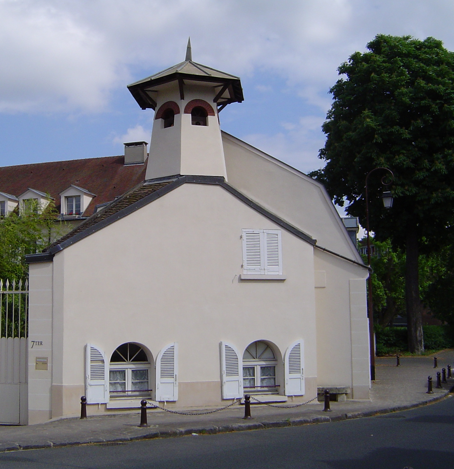 Antony